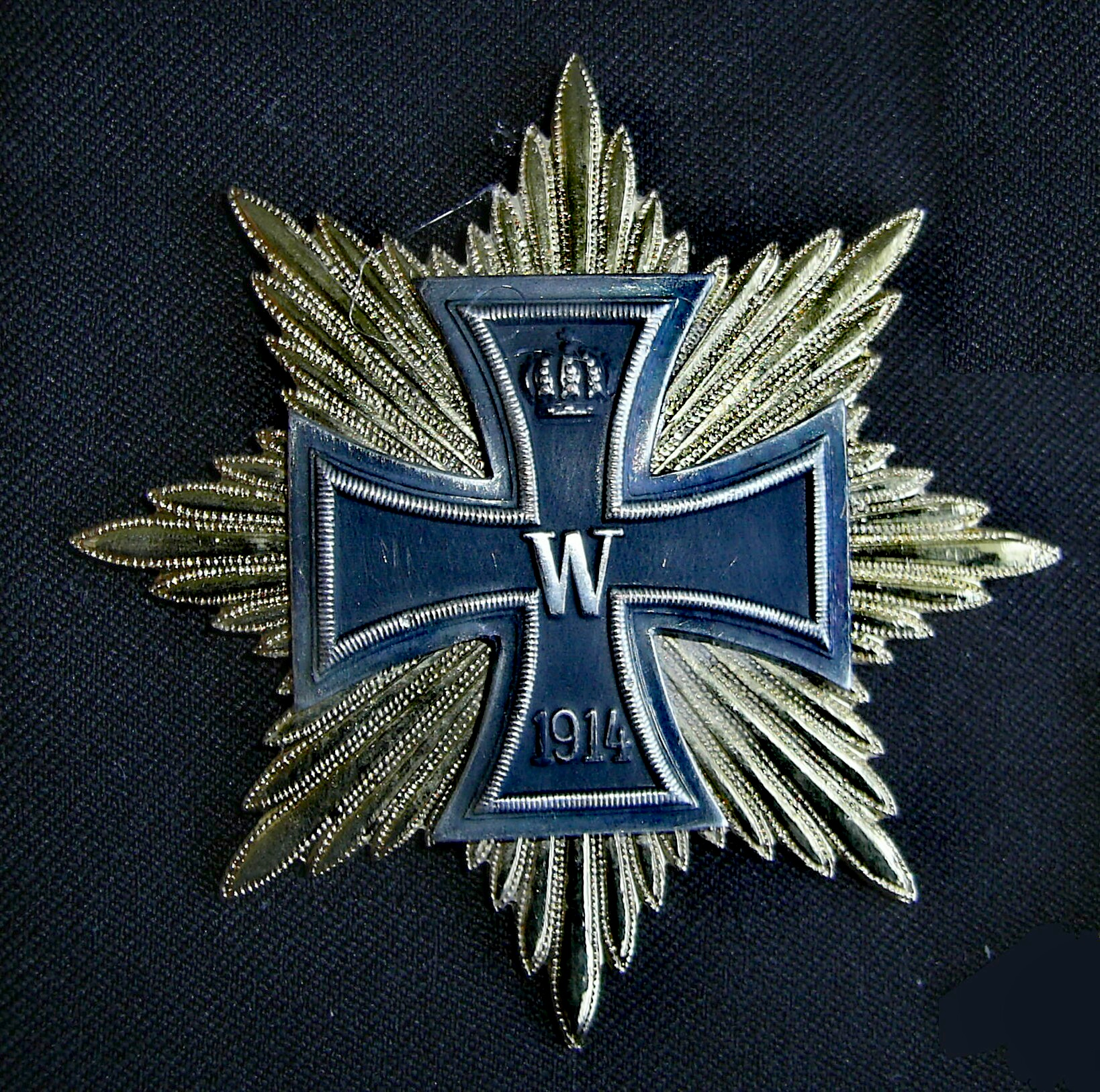 Hindenburgstern